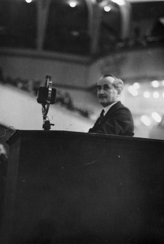 Berlin, Aloys Fürst zu Löwenstein Löwenstein, Fürst, Alois, 1930, Antibolschewistische Kundgebung des Deutschen Bundes zum Schutze der abendländischen Kultur im Sportpalast. Fürst Löwenstein spricht [Berlin, Sportpalast.- Rede von Aloys Prinz zu Löwenstein-Wertheim-Rosenberg] Abgebildete Personen: Löwenstein-Wertheim-Rosenberg, Aloys Fürst zu: 1871-1952; Jurist, MdR, Zentrum, Präsident des Zentralkomitees der deutschen Katholiken, Deutschland